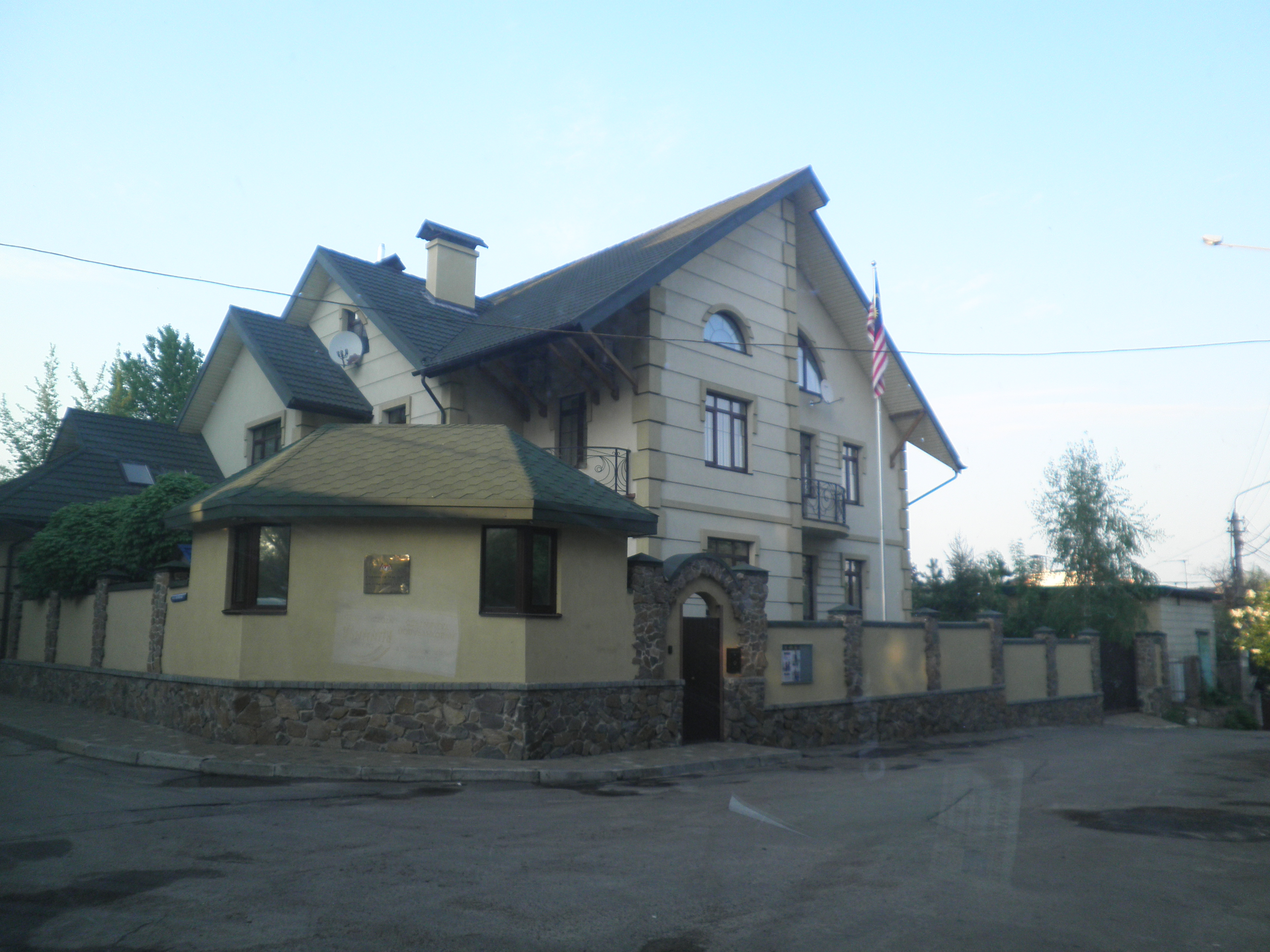 Посольство Малайзії в Україні: Посольство Малайзії в Україні